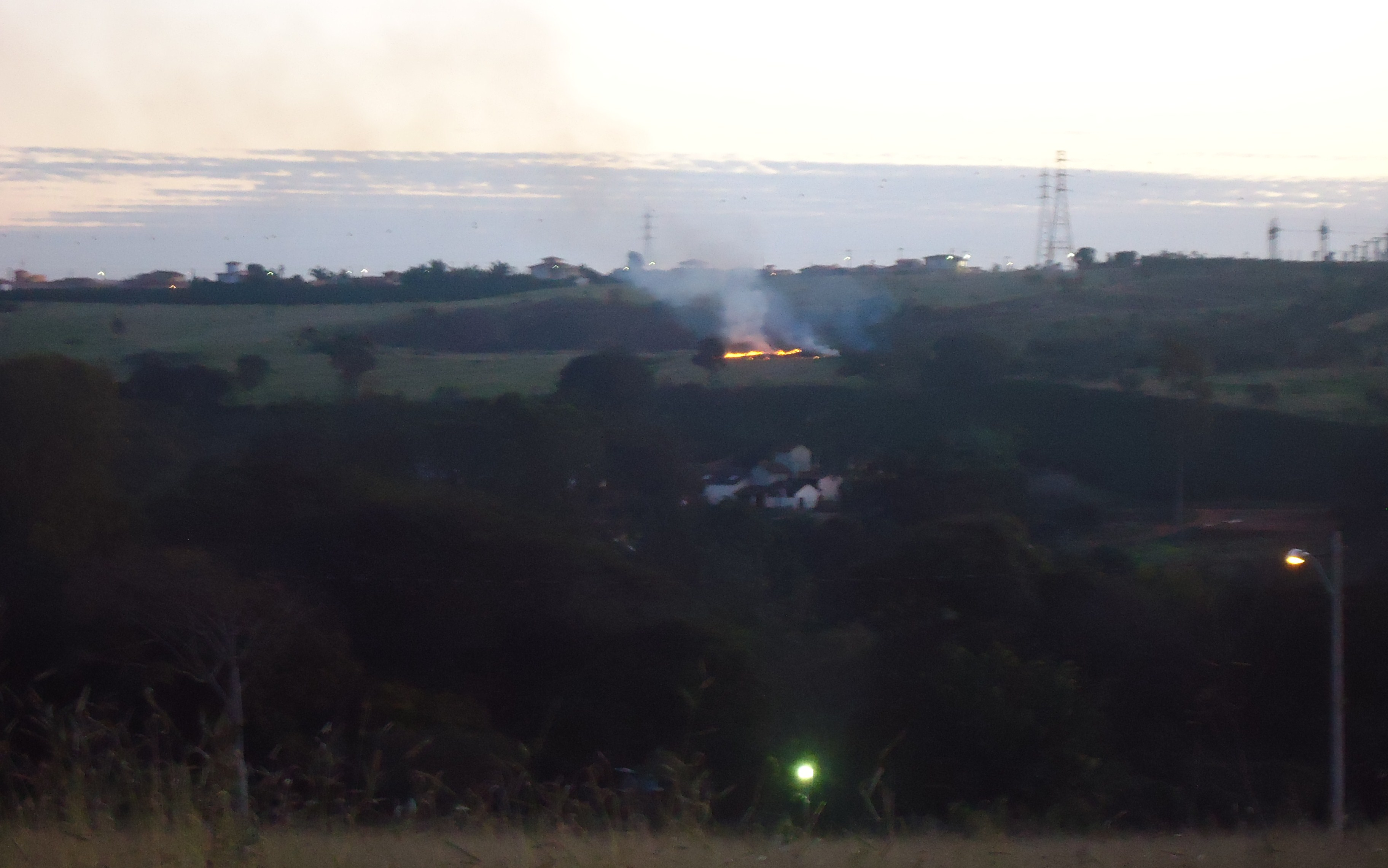 Fotografia de um pequeno incêndio próximo à zona urbana da cidade em julho de 2012.